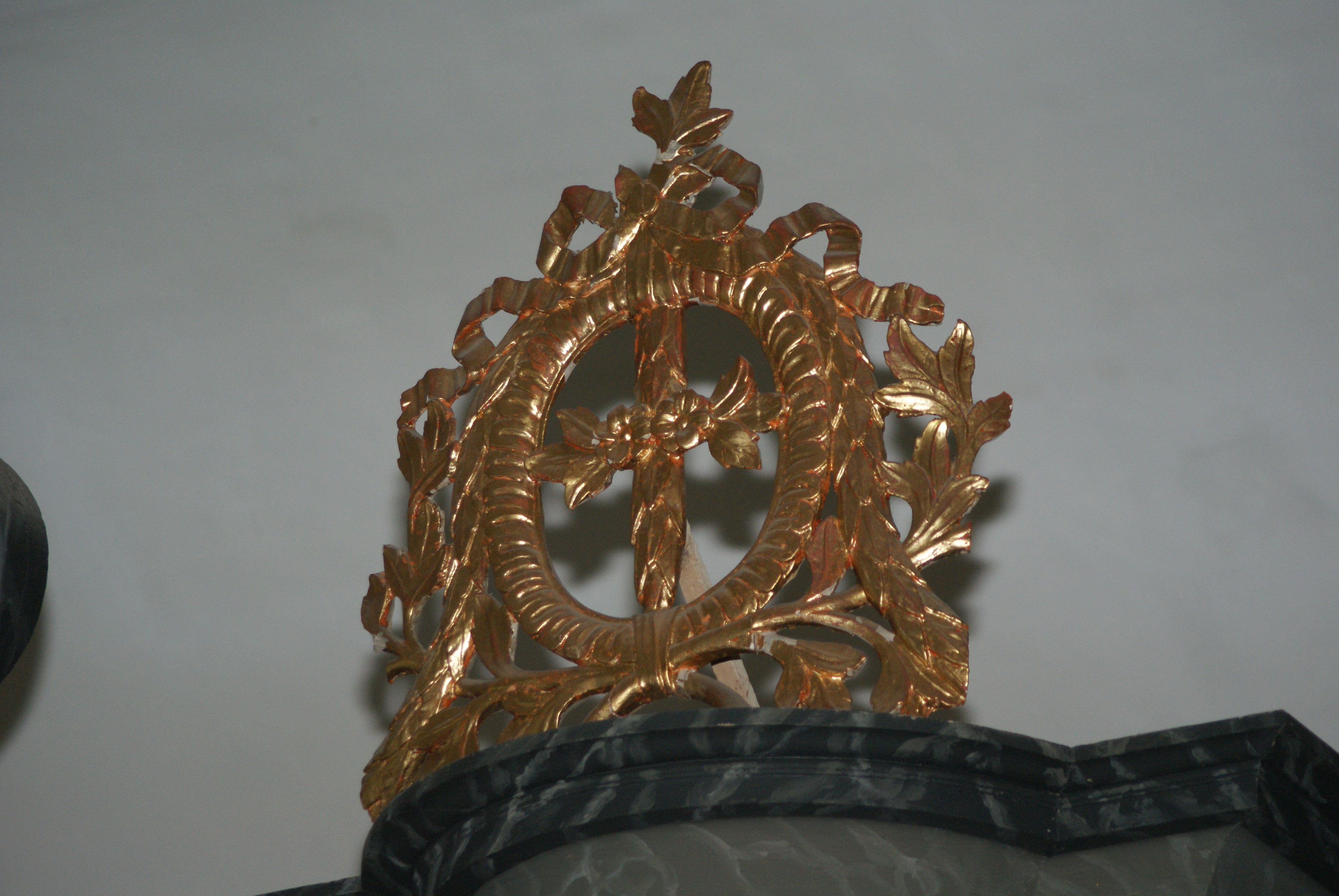 Bekrönung der Orgel in der Evangelischen Kirche in Nieder-Moos, Hessen, Deutschland